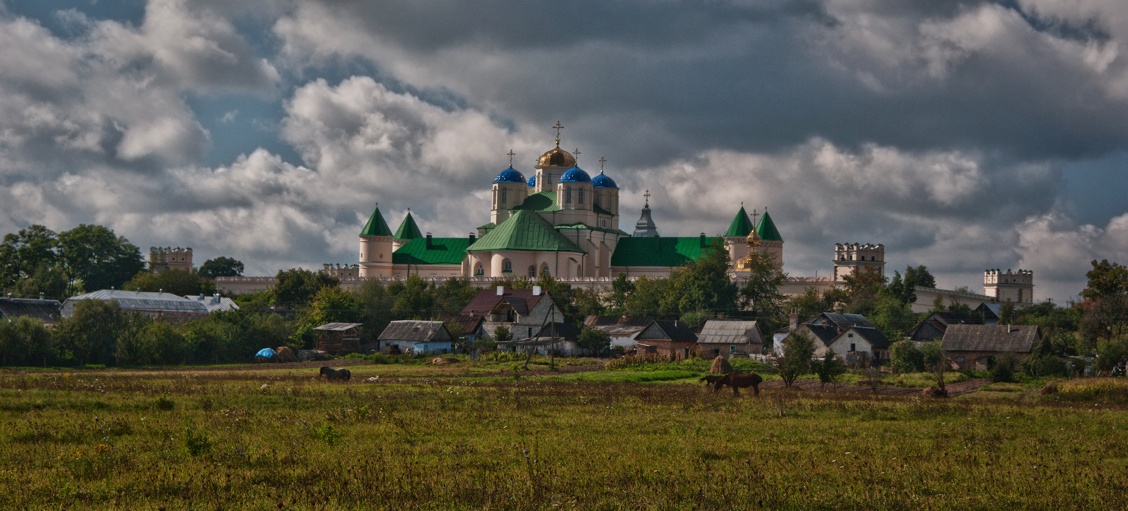 Троїцький монастир-фортеця (XV-XVII ст.) в селі Межиріч